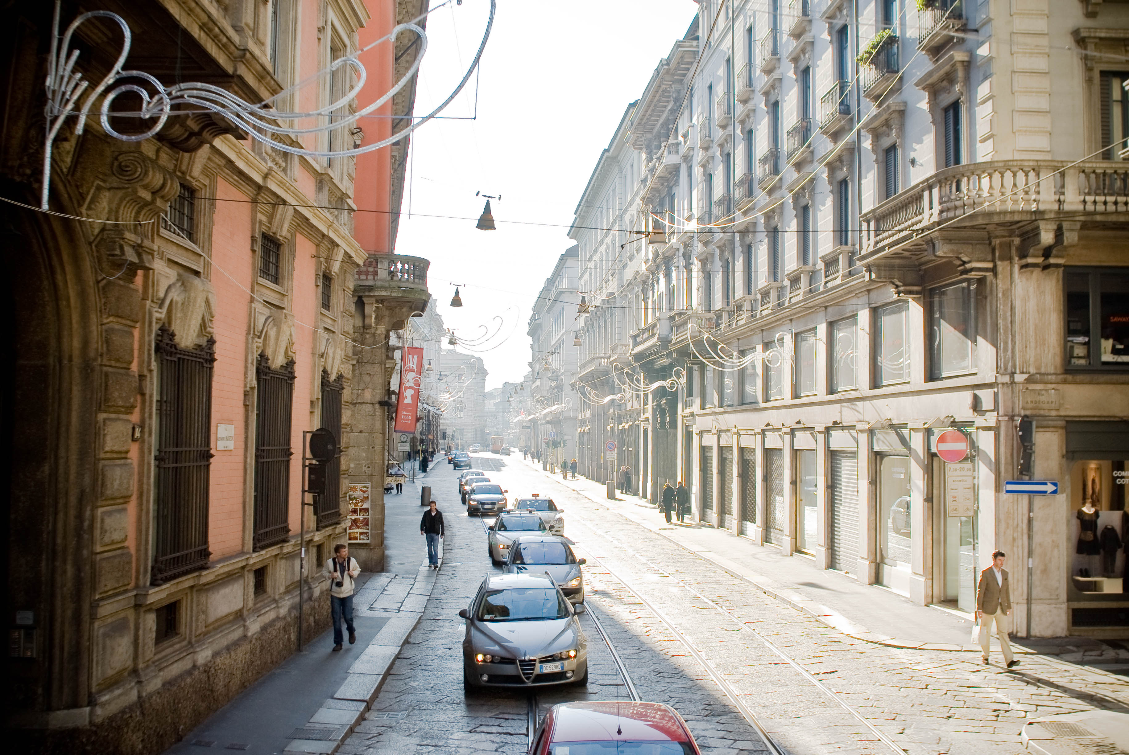 Milan, via Manzoni